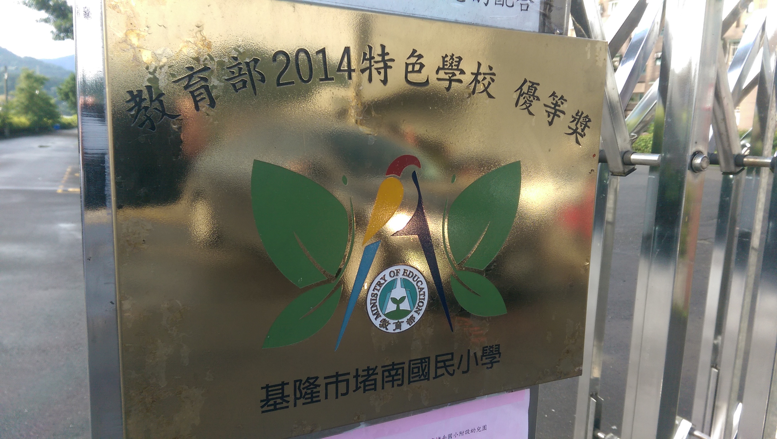 中文（台灣）: 基隆市七堵區堵南國民小學正門懸掛的中華民國教育部2014特色學校優等獎銘板。